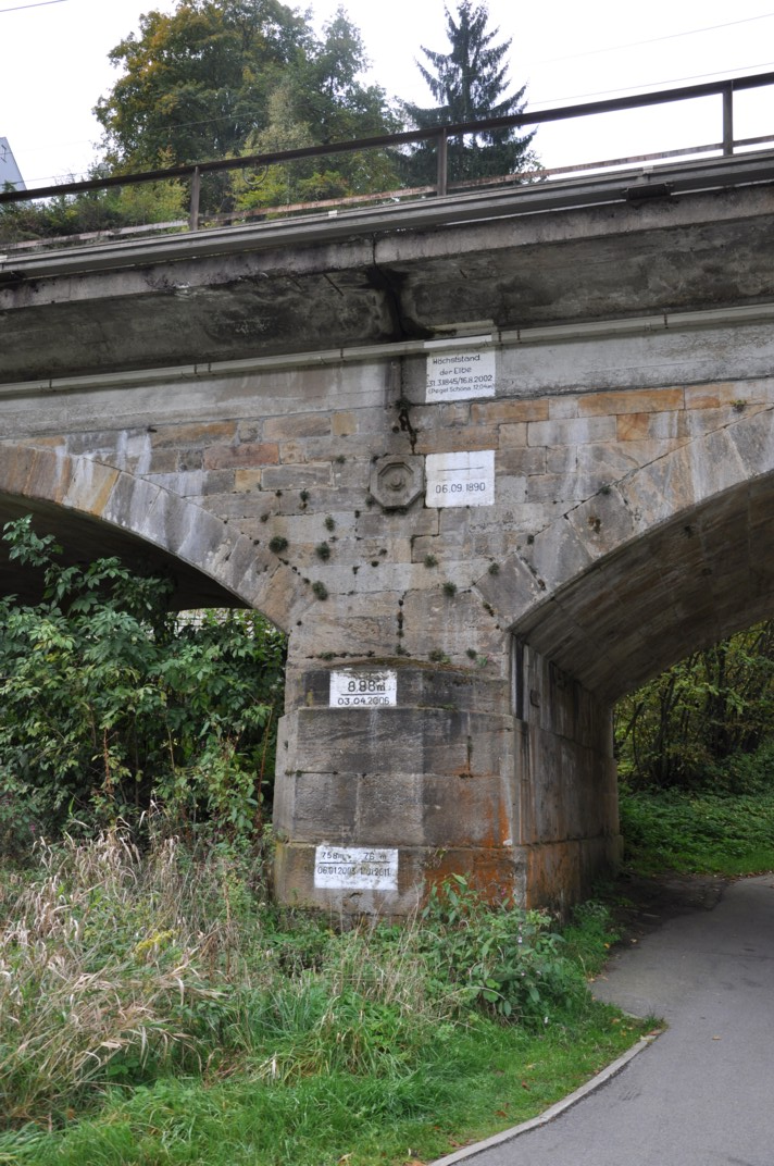 Viadukt Hirschgrund, Pfeiler mit Pegelmarken, Bahnstrecke Děčín–Dresden-Neustadt